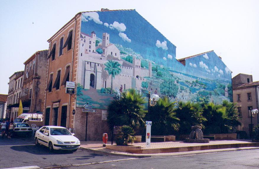 Vue du centre de La Palme dans l'Aude